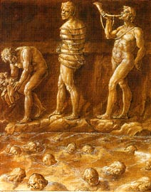 Divina Commedia, Inferno, Canto 31